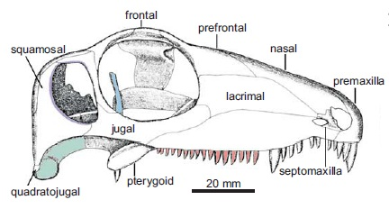 Haptodus garnettensis Currie, 1977 (modified from Laurin 1993). The quadrate is colored in green, epipterygoid in blue, upper postcanines in orange, and upper margin of the temporal fenestra in purple.